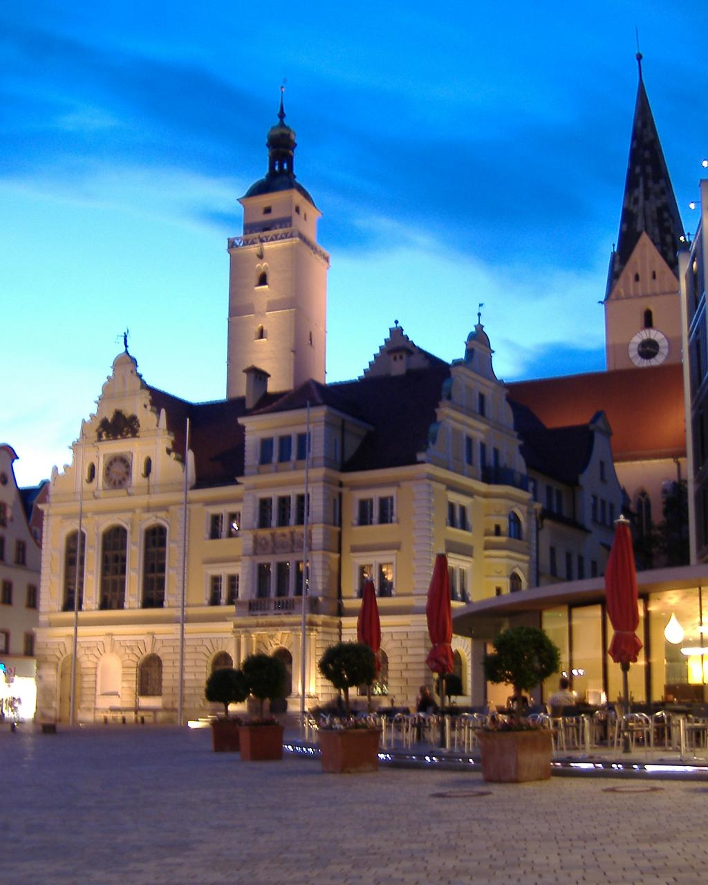 Der Rathausplatz mit Altem Rathaus, Pfeiffturm, Turm der Moritzkirche und Teil des Neuen Rathauses (v.l.n.r.).